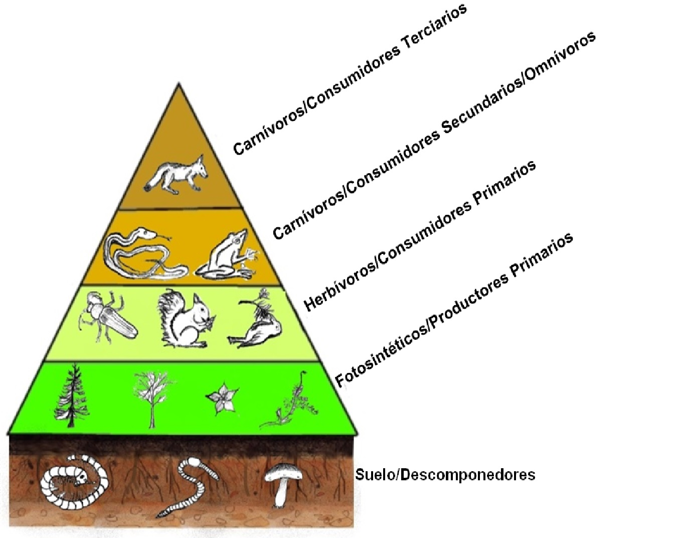 Pirámide trófica de cuatro niveles. Traducida al español de su versión en inglés.